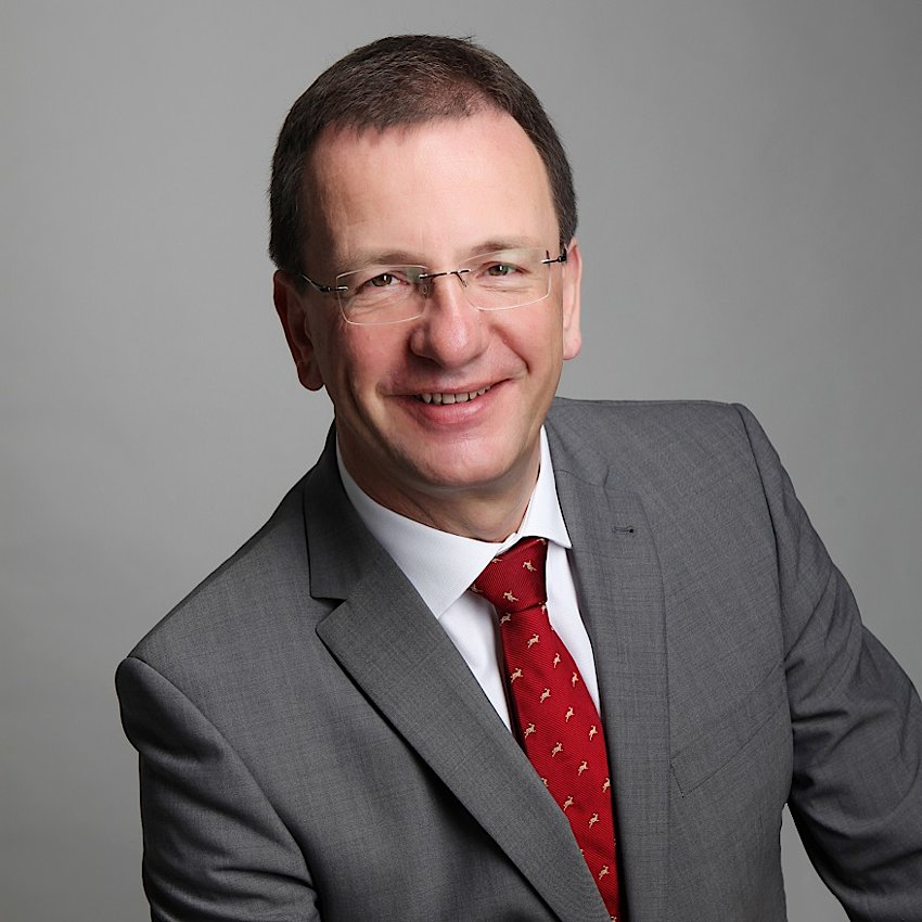 Andreas Haas als Bürgermeister